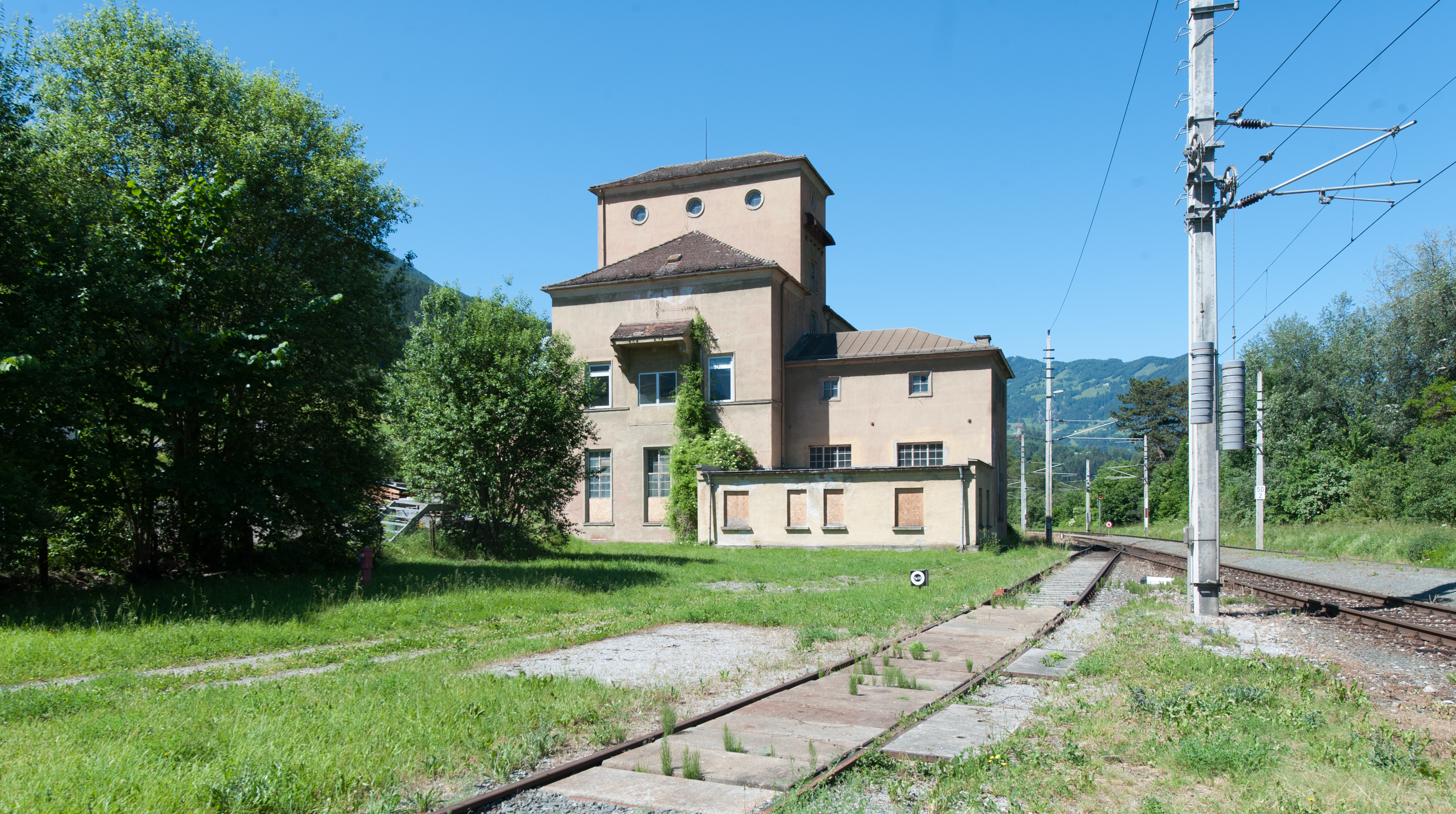 Wiki takes Nordtiroler Oberland: Unterwerk Roppen